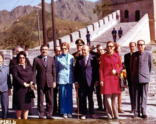 فرح پهلوی و امیرعباس هویدا در بازدید از چین - 2 مهر 1351